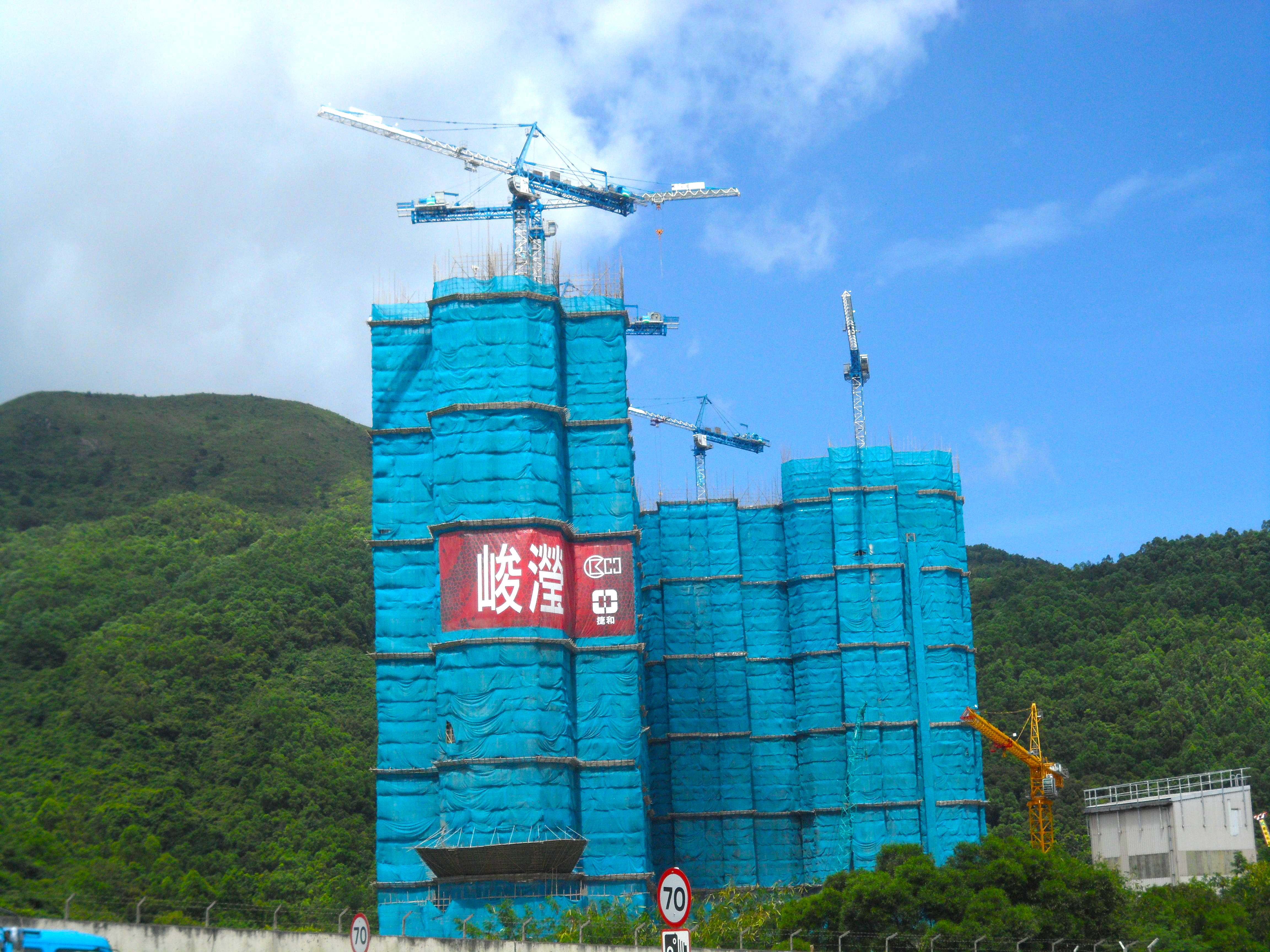 私人樓宇--峻瀅